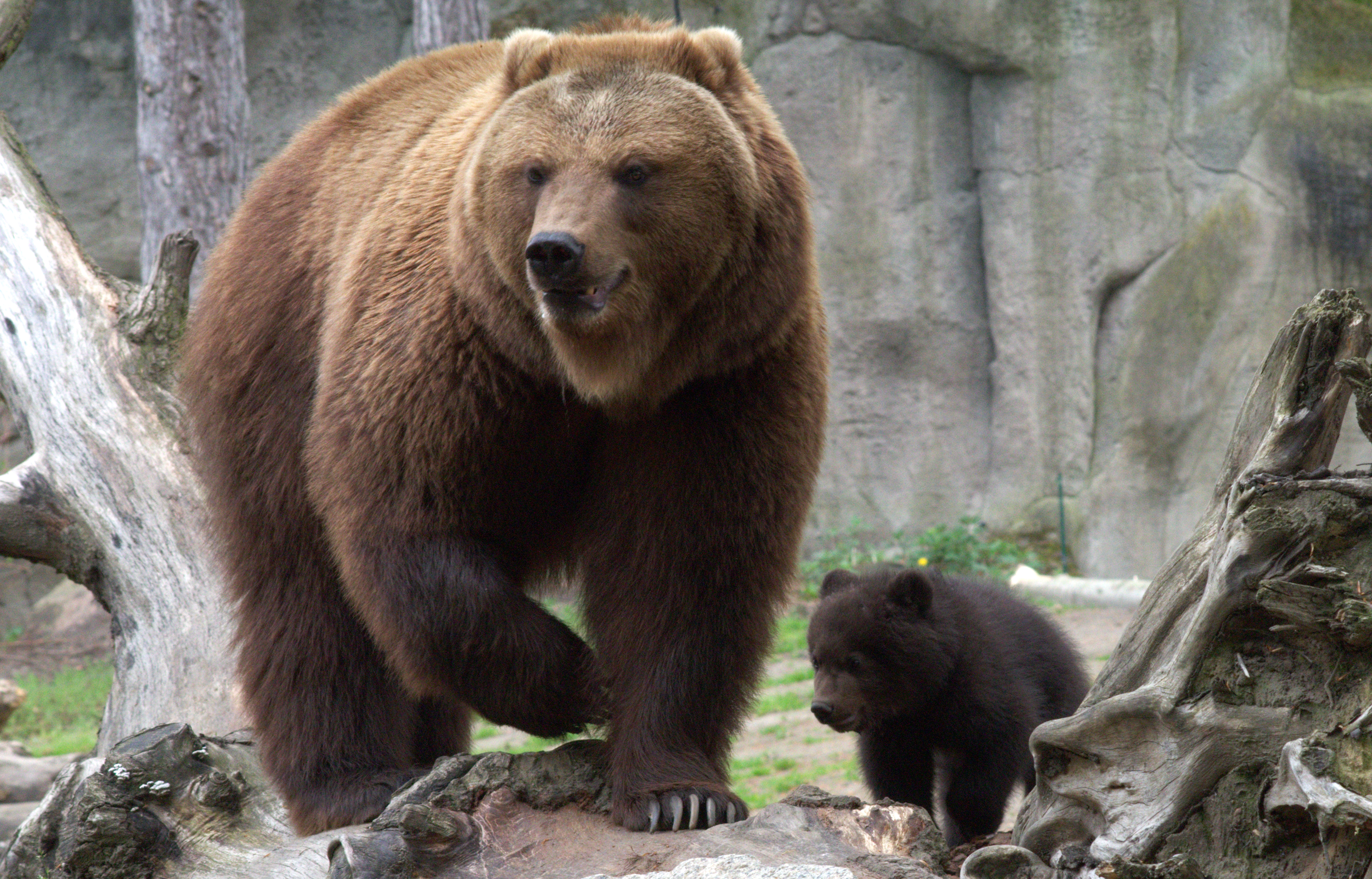 Oursonne et son petit